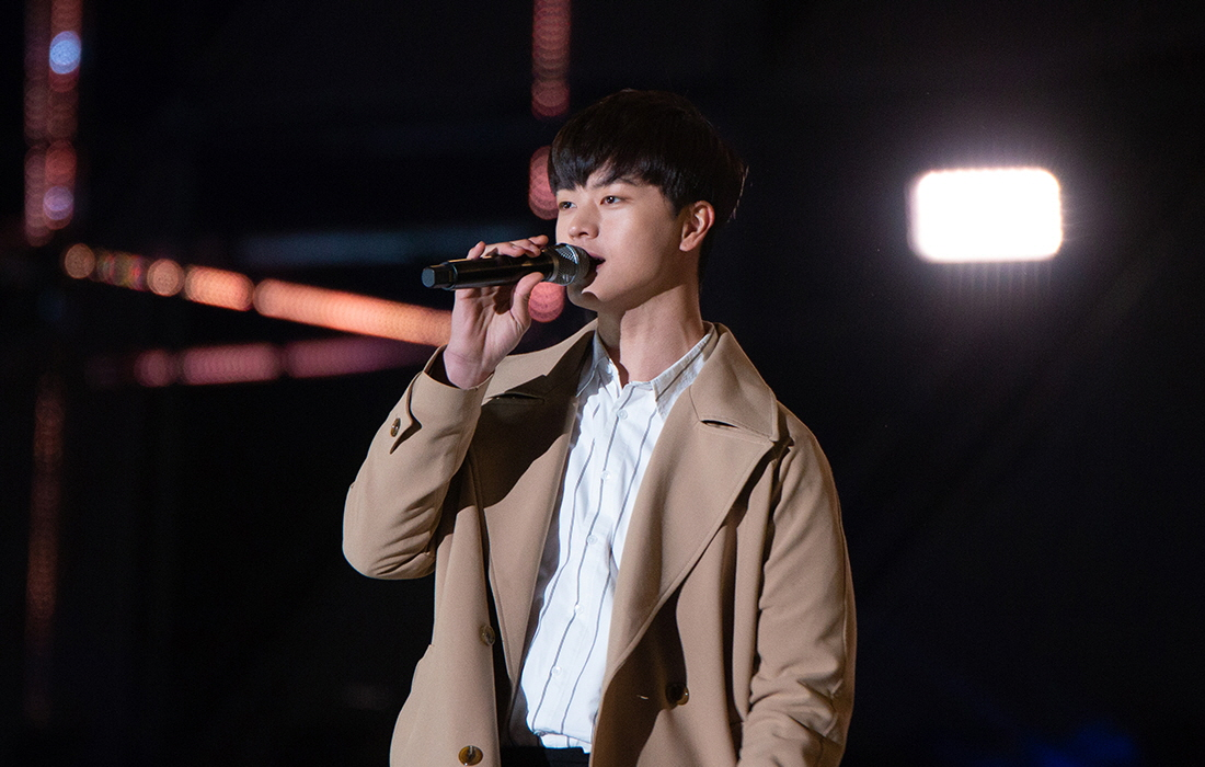 20180407 육성재 비투비 동계올림픽&동계페럴림픽 성공 기념 국민 감사 대축제